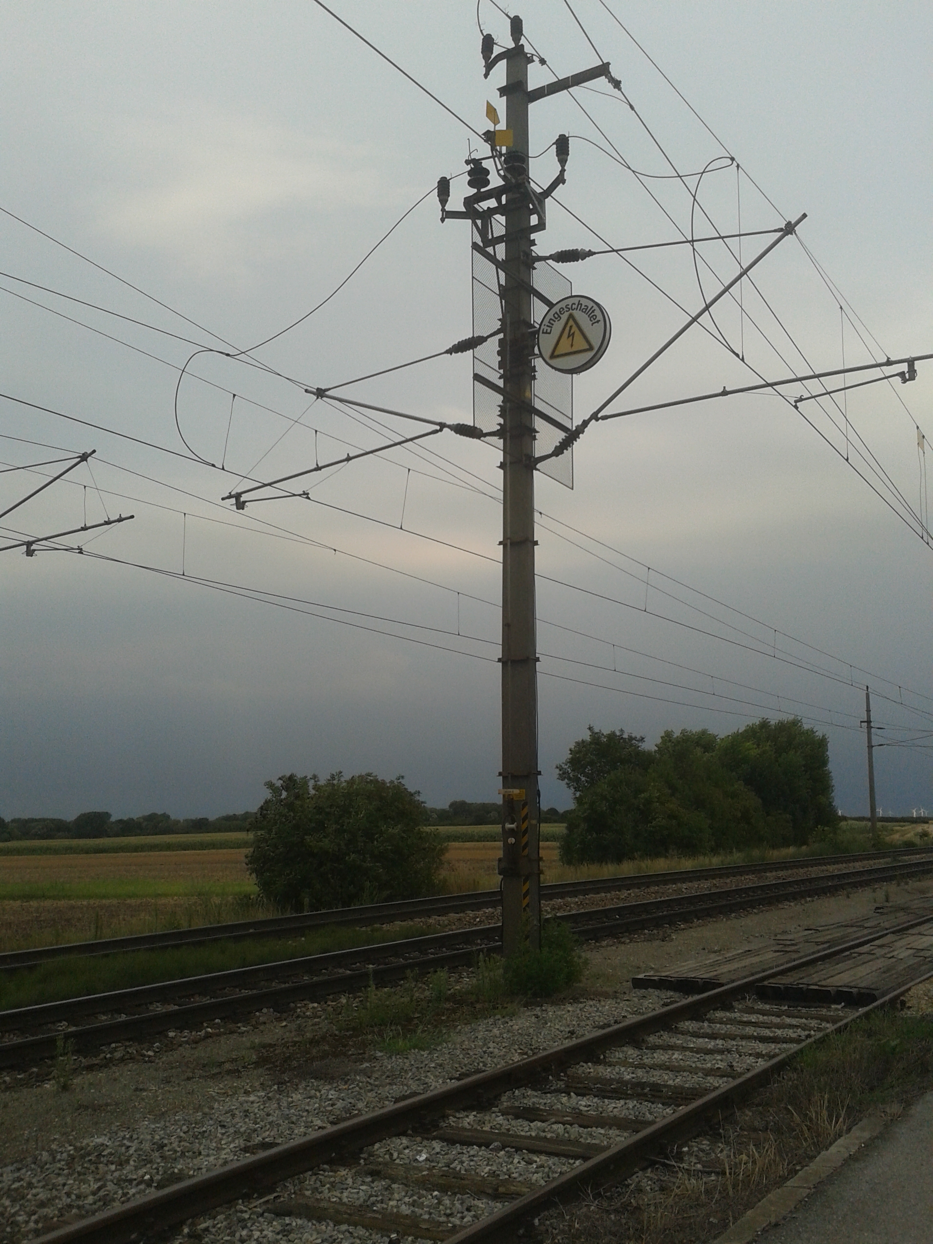 Ladegleisschalter am Ladegleis des Bf. Nickelsdorf mit Schaltanzeiger in eingeschalteter Stellung. (August 2016)